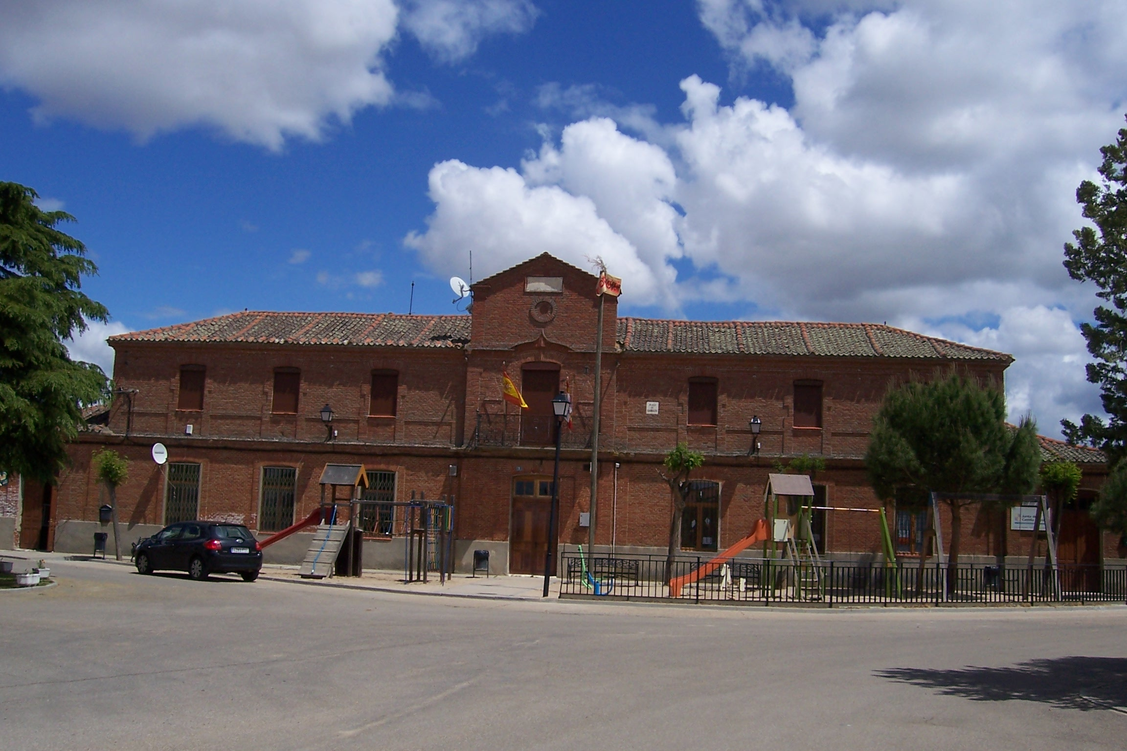 Ventosa de la Cuesta (Valladolid, España). Ayuntamiento.